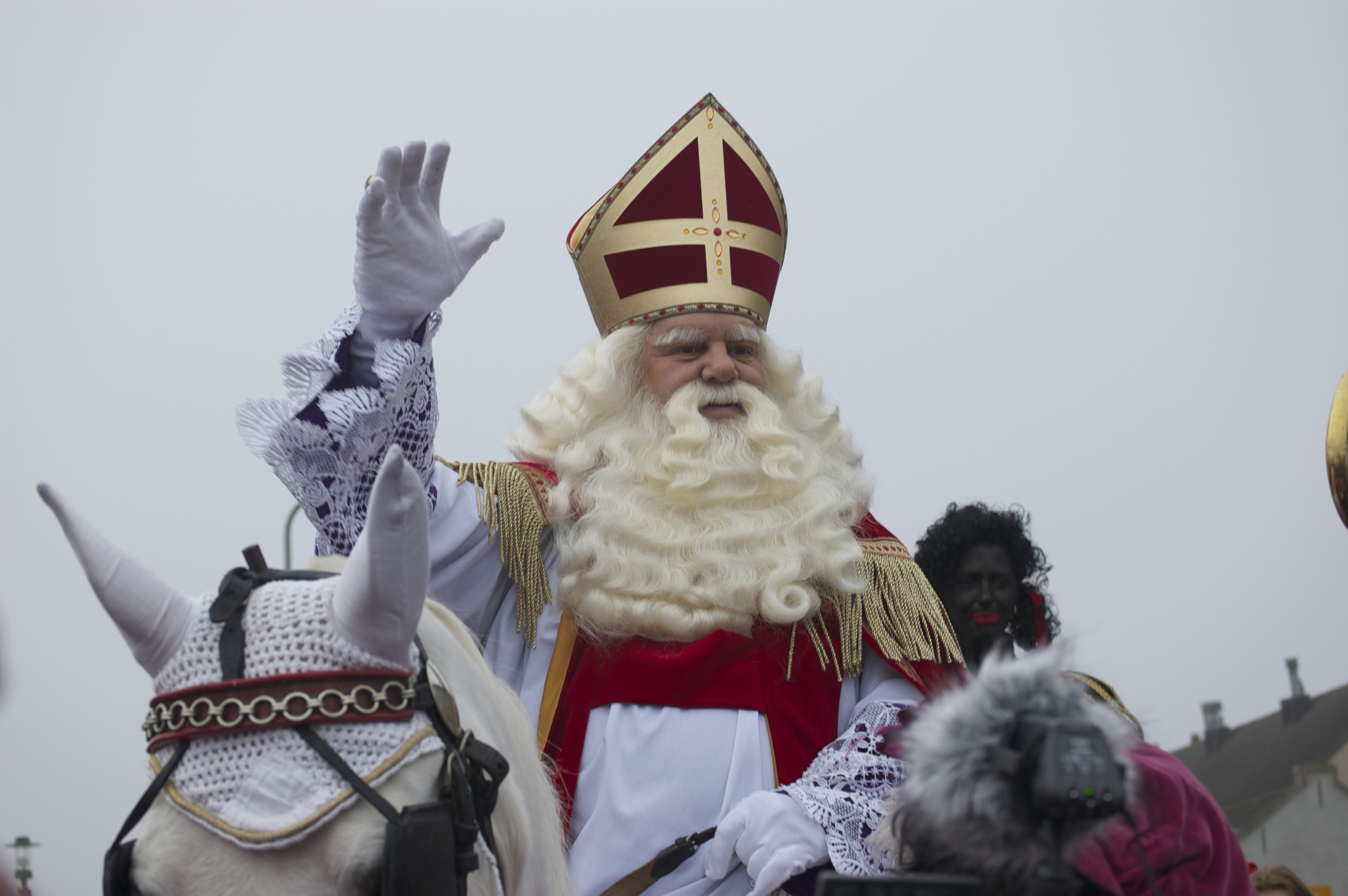 Intocht van Sinterklaas, Vuykterrein Capelle aan den IJssel.